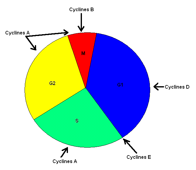 Schéma du cycle cellulaire